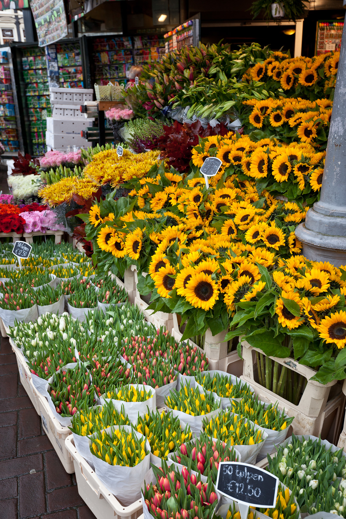 Amsterdam